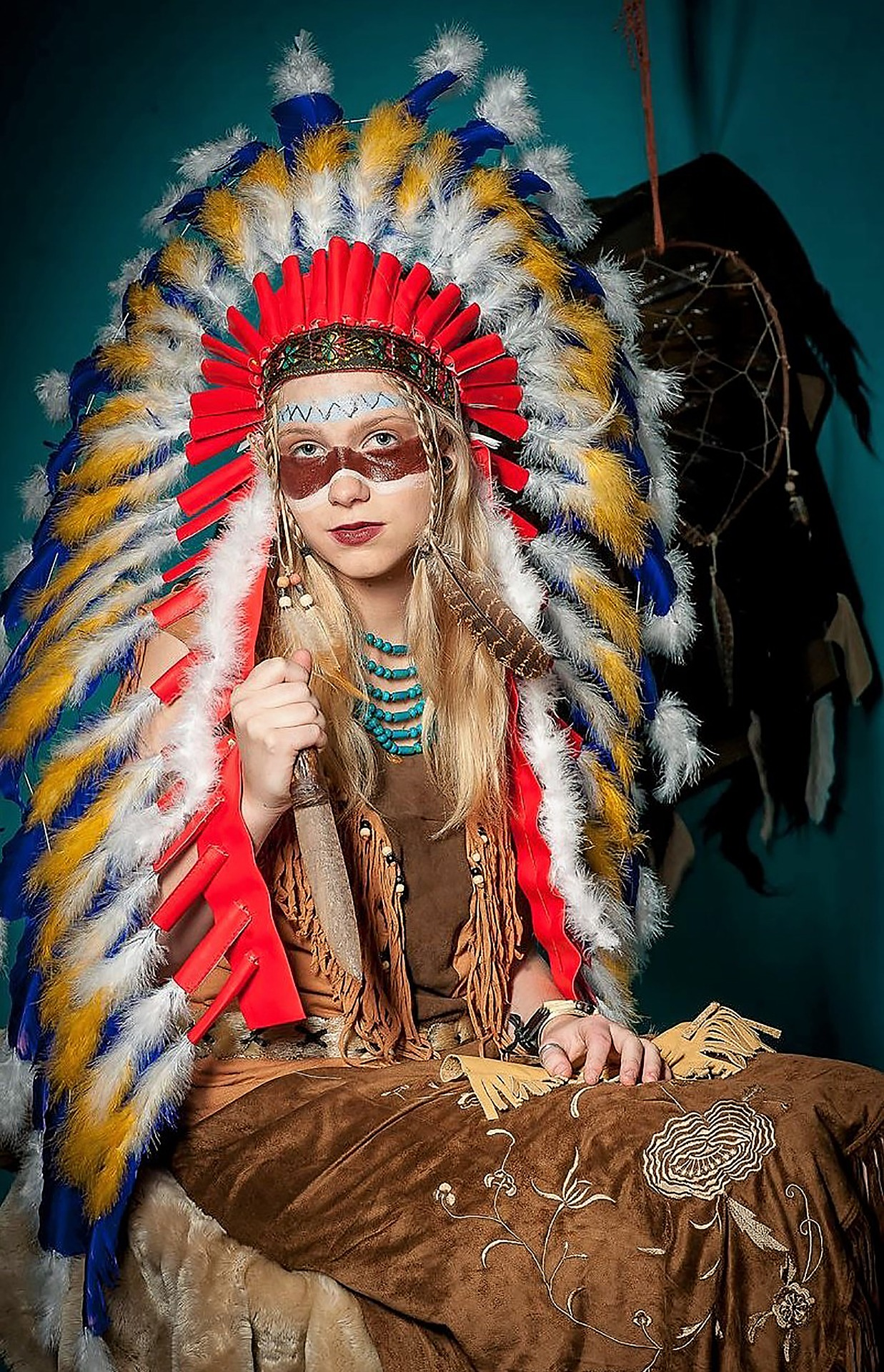 Photographie d'un modèle arborant des attributs vestimentaires à priori natif-américains